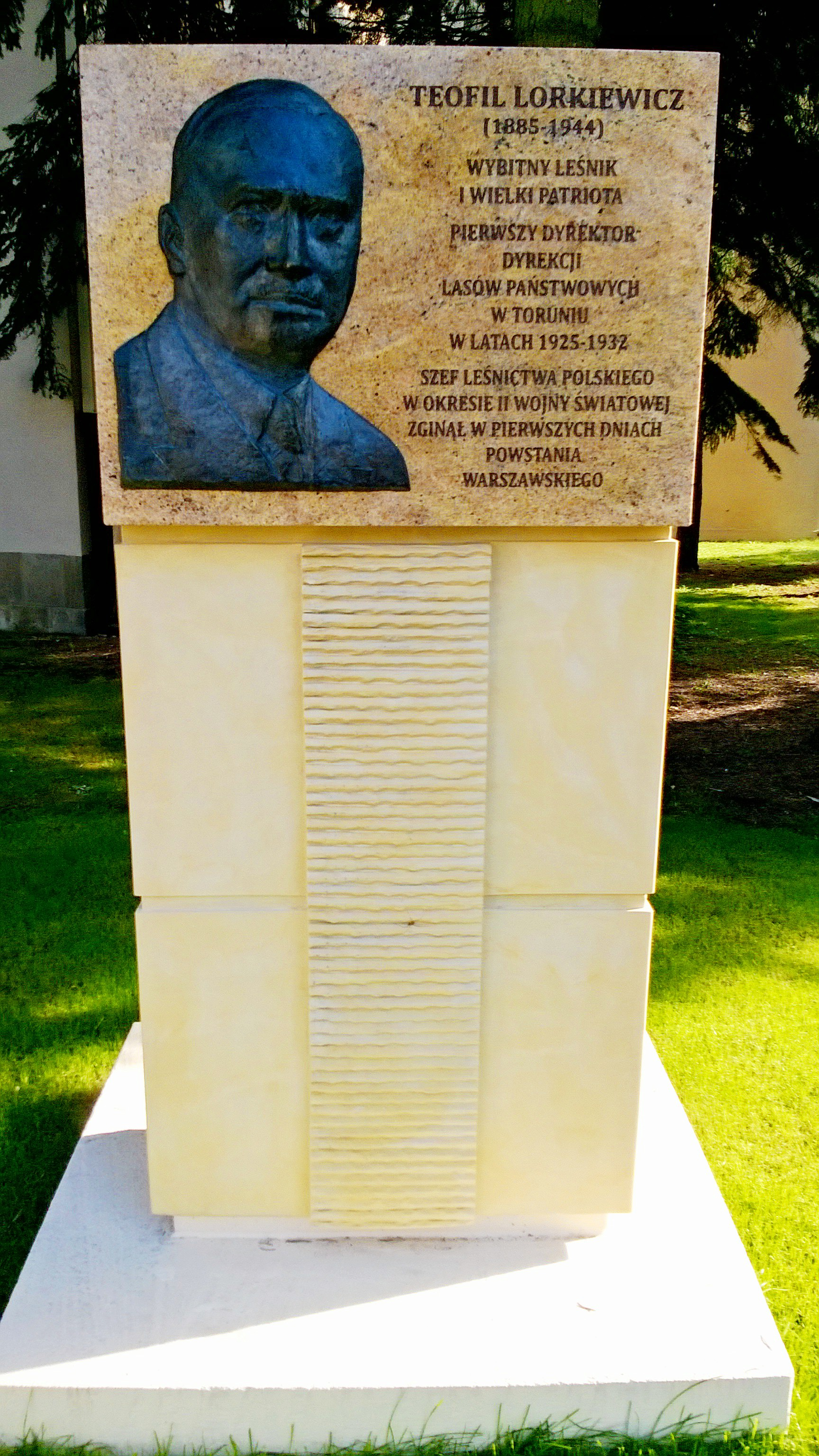 Obelisk Teofila Lorkiewicza w Toruniu